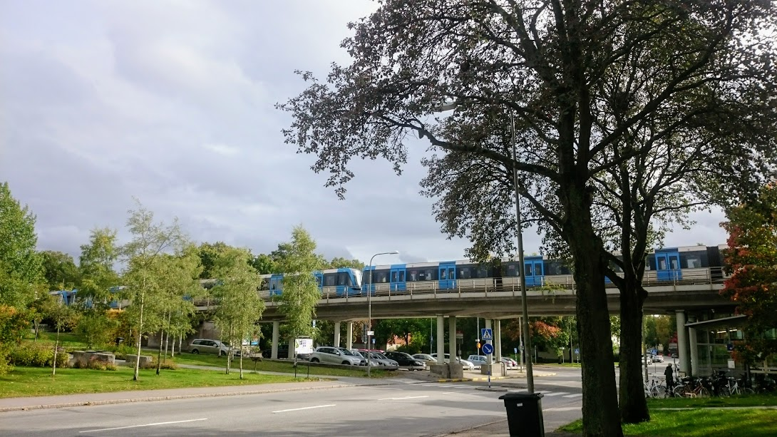 Tunnelbanan passerar ovanför Ulricehamnsvägen.